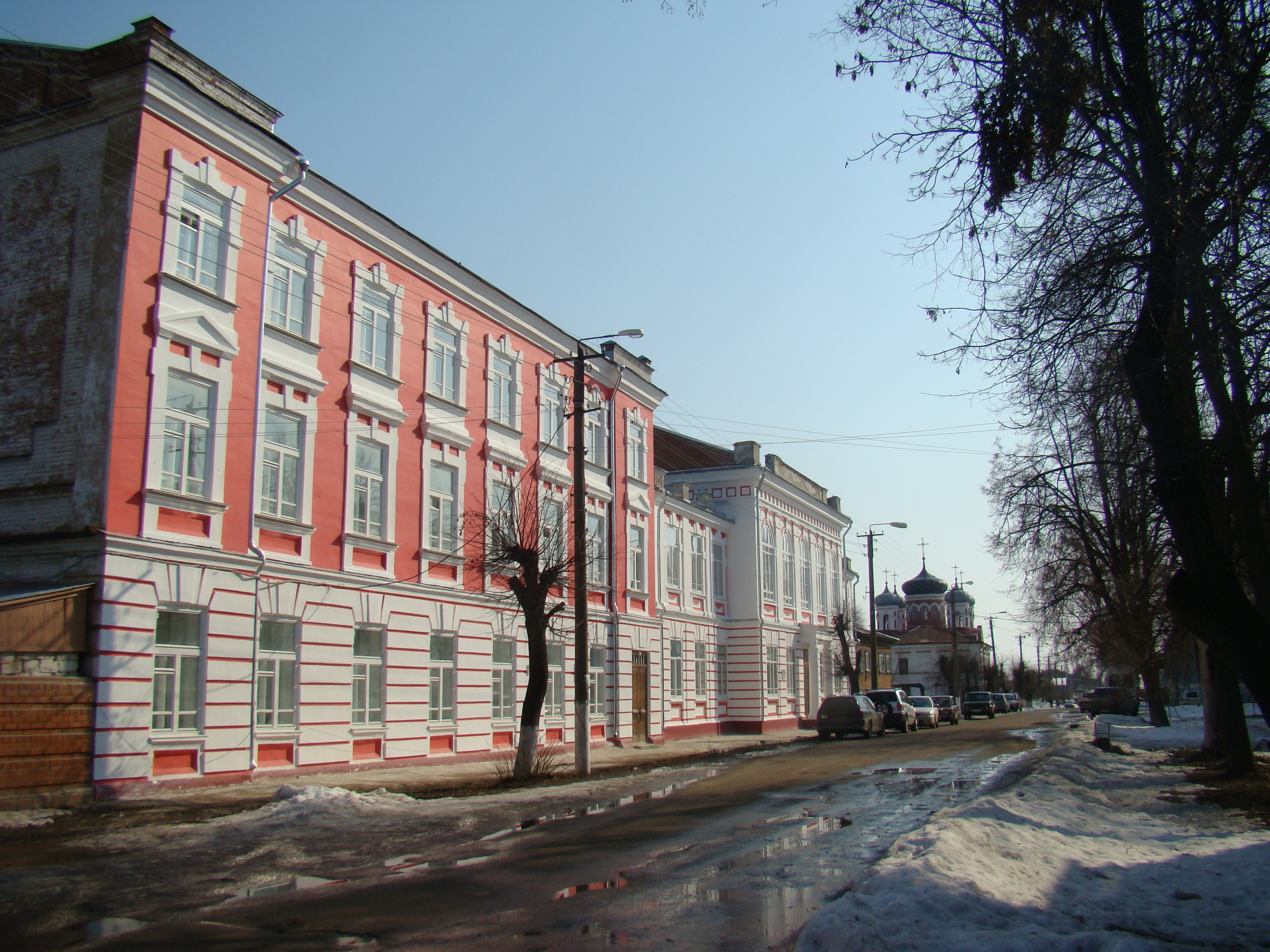 Корпус учебный (Республика Марий Эл, Козьмодемьянск, Советская улица, 33)